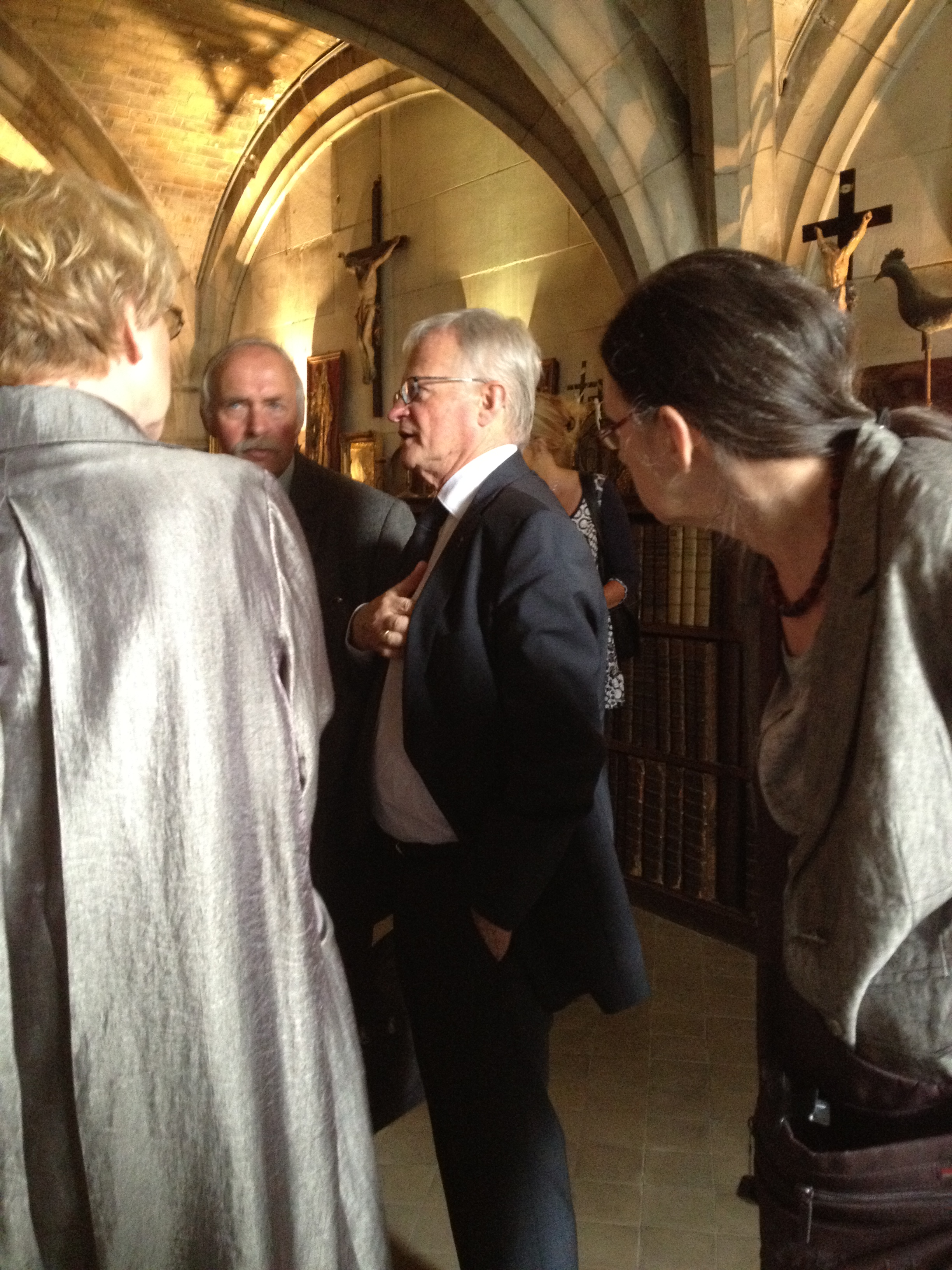 Jean-Charles Descubes, archevêque de Rouen, lors du colloque international tenu à l'archevêché le 1 juin 2012.